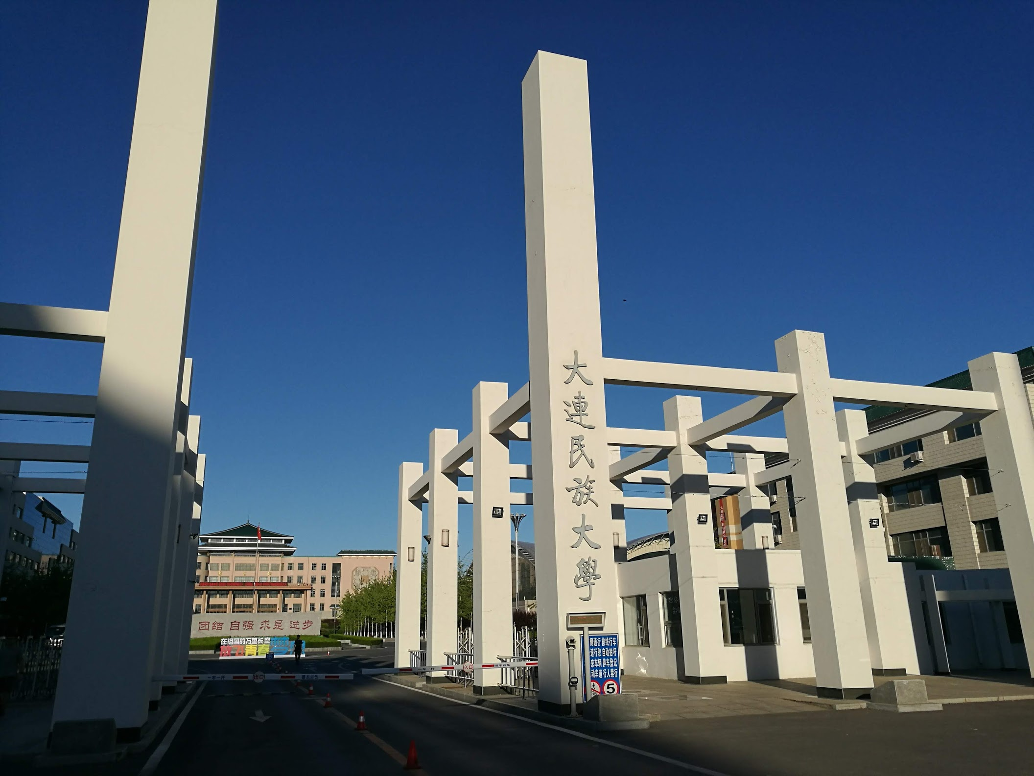 开发区校区大门